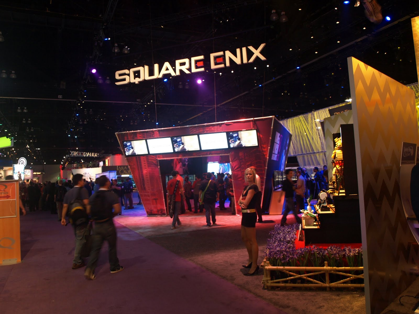 Vista del stand de la compañía Square Enix en el E3 2010 de Los Angeles (EEUU).